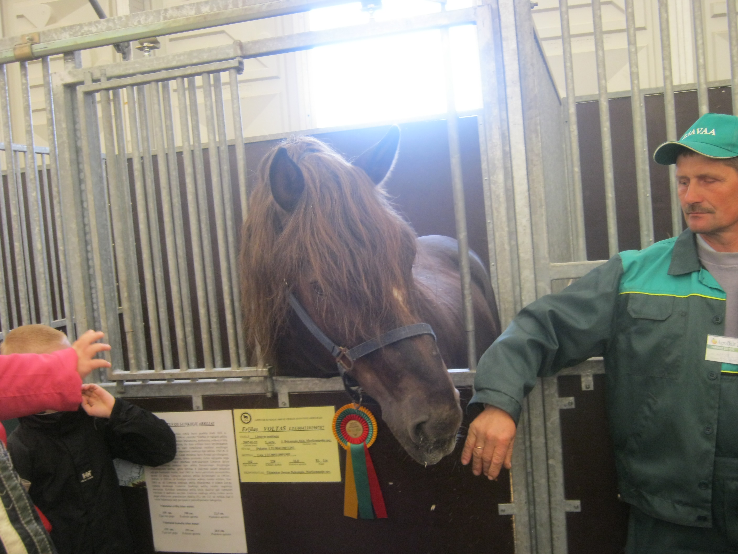 Vardas: VOLTAS, Lytis: Eržilas, Veislė: Hanoveriai, Spalva: bėra, Gimimo data: 2000.04.25